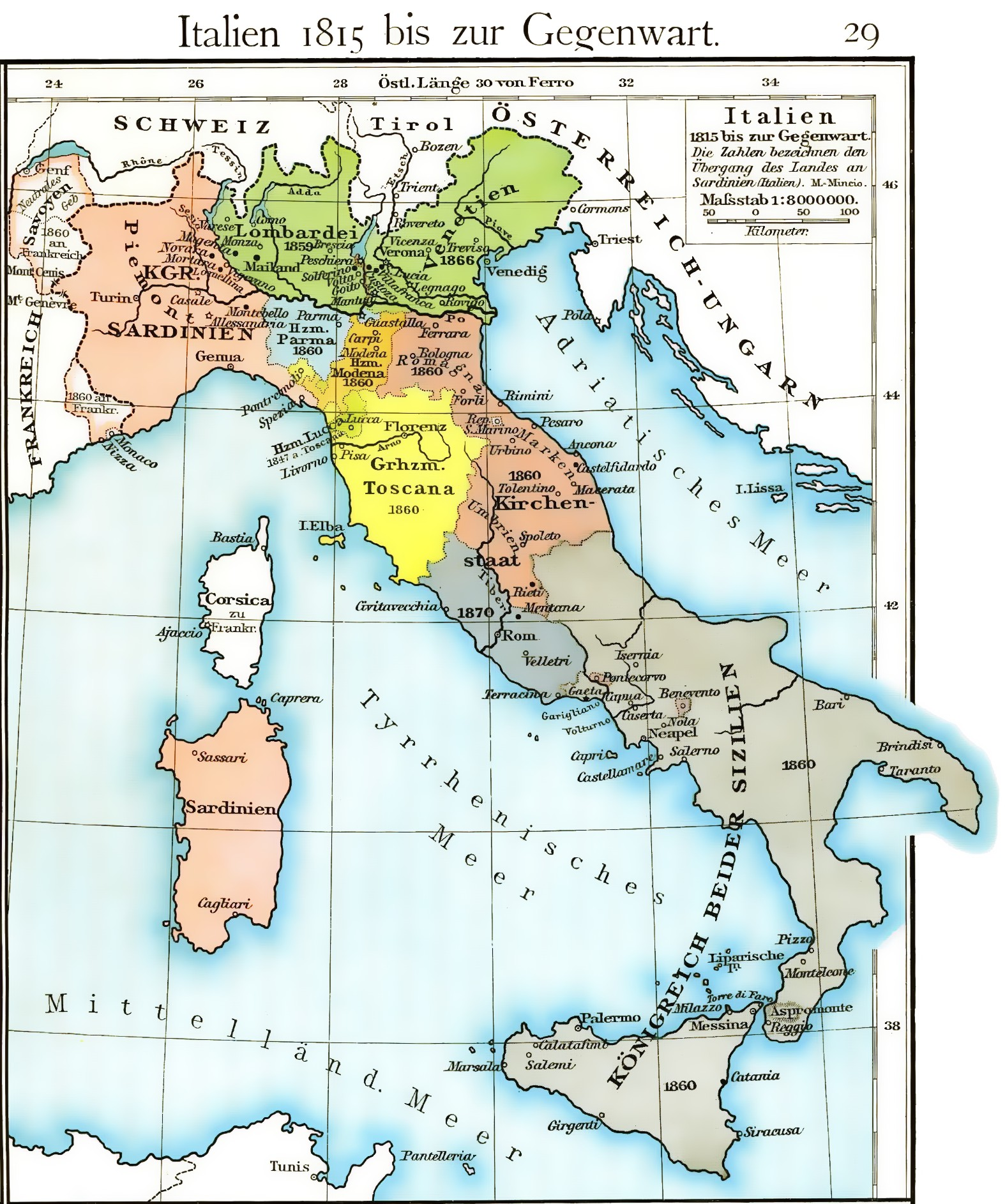 Cartina dell'unificazione d'Italia dal 1815 fino al 1870